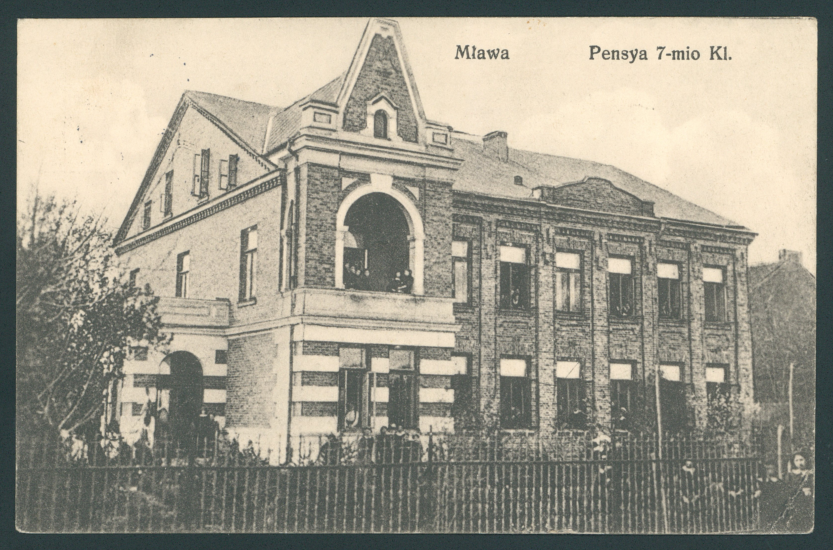 rok 1915, ilustracja; 9x14 cm - pocztówka